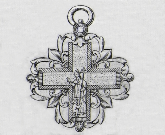 Gravure du début du XVIIIe siècle représentant la croix pectorale des premiers chanoines de Saint-Claude de 1742 à 1750 (abbaye de Saint-Claude dans le département actuel du Jura). Illustrations figurant dans Histoire de l'abbaye et de la terre de Saint-Claude par Dom Paul Benoît, Montreuil-sur-Mer, 1892,p. 751. [1]